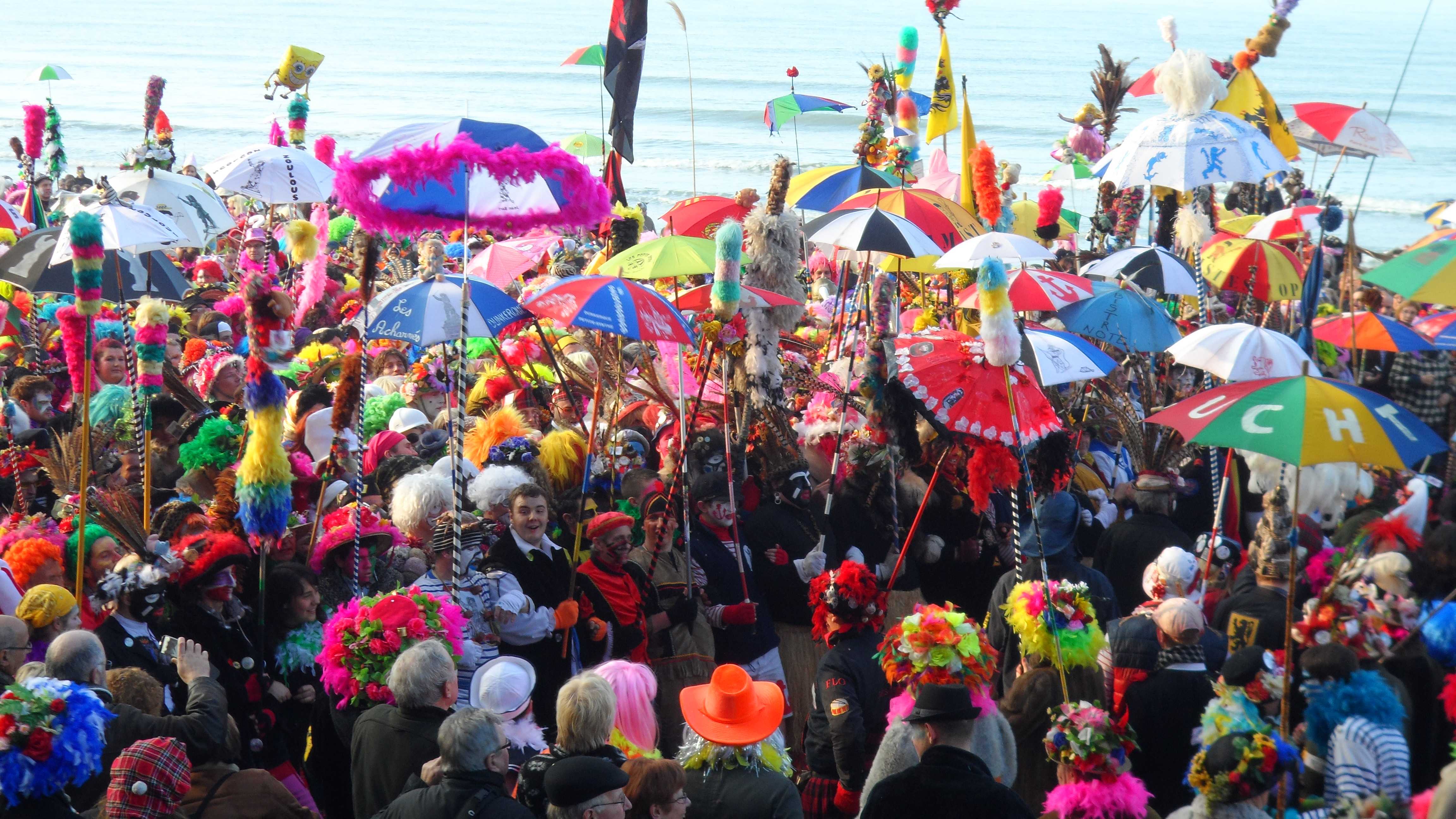 Les premières lignes lors de la bande de Malo-les-Bains